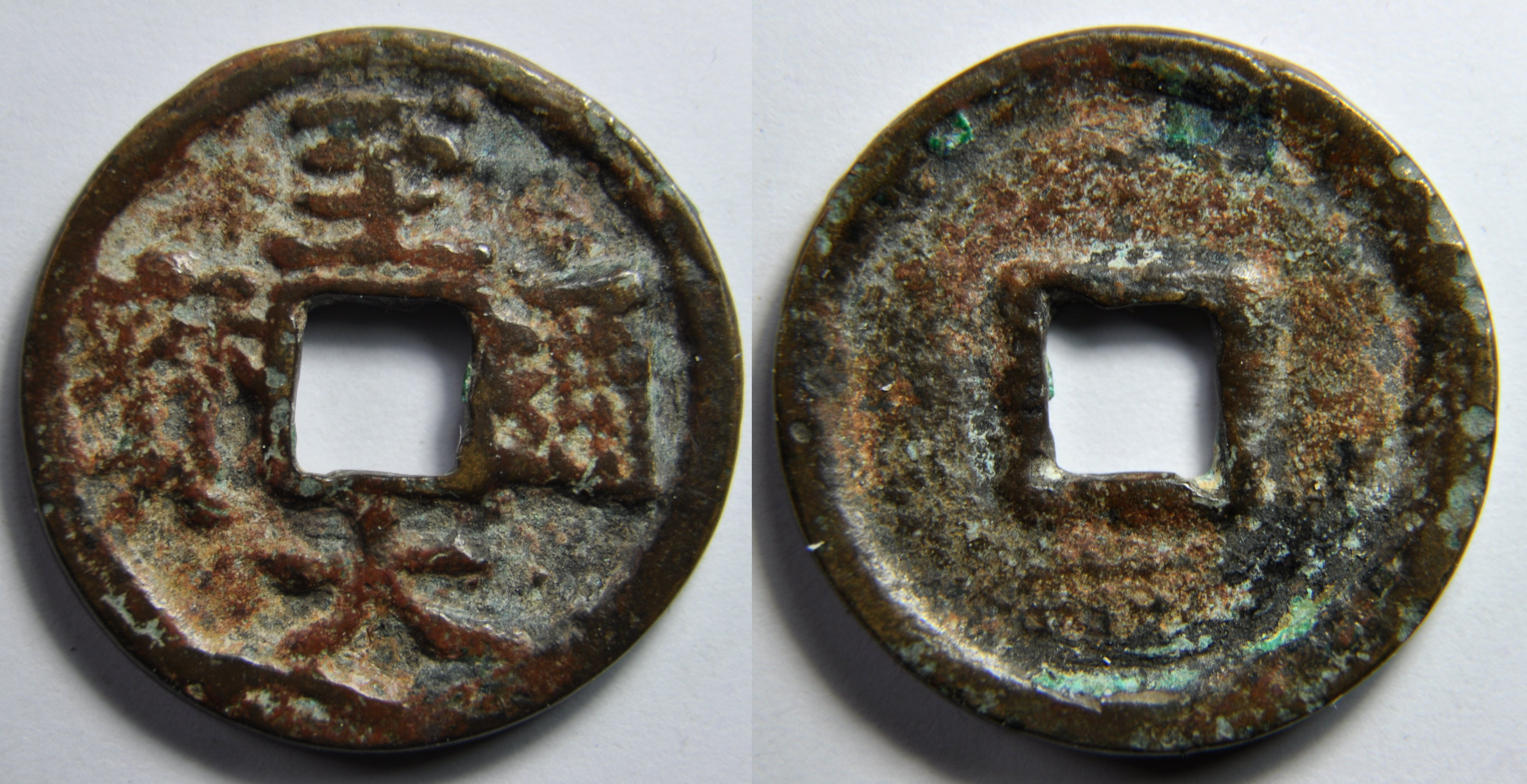 Une monnaie d'une sapèque en bronze de l'empereur Wu Zong (Khaishan) (1308-1311), ère Zhi Da (1308-1311) de la dynastie Yuan (mongole) (1271-1367). A/ Zhi da tong bao (Monnaie courante de Zhi Da) R/ vide Dimension : 23 mm Poids : 4 g. Calligraphie régulière ; lecture en croix. Référence : H19.39 ; C201 BNF Cette monnaie est une monnaie divisionnaire d'une valeur d'un li d'argent. Il y a aussi de grandes monnaies valant 10 petites donc un fen d'argent (0,4 g.). Il existe aussi des billets. Ces sapèques n'ont plus été utilisé pendant le règne suivant : l'usage des sapèques est interdit.